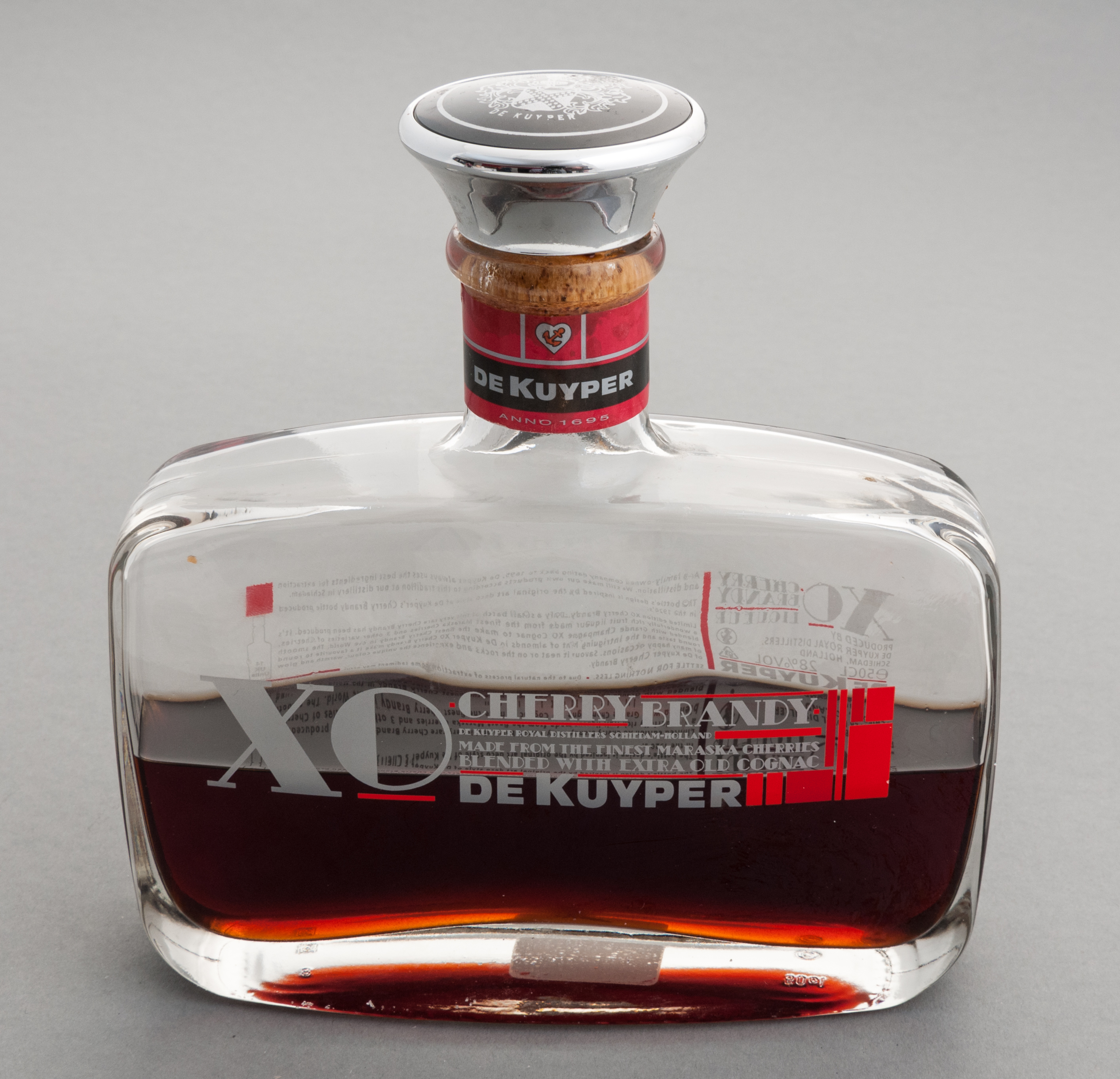 Flasche